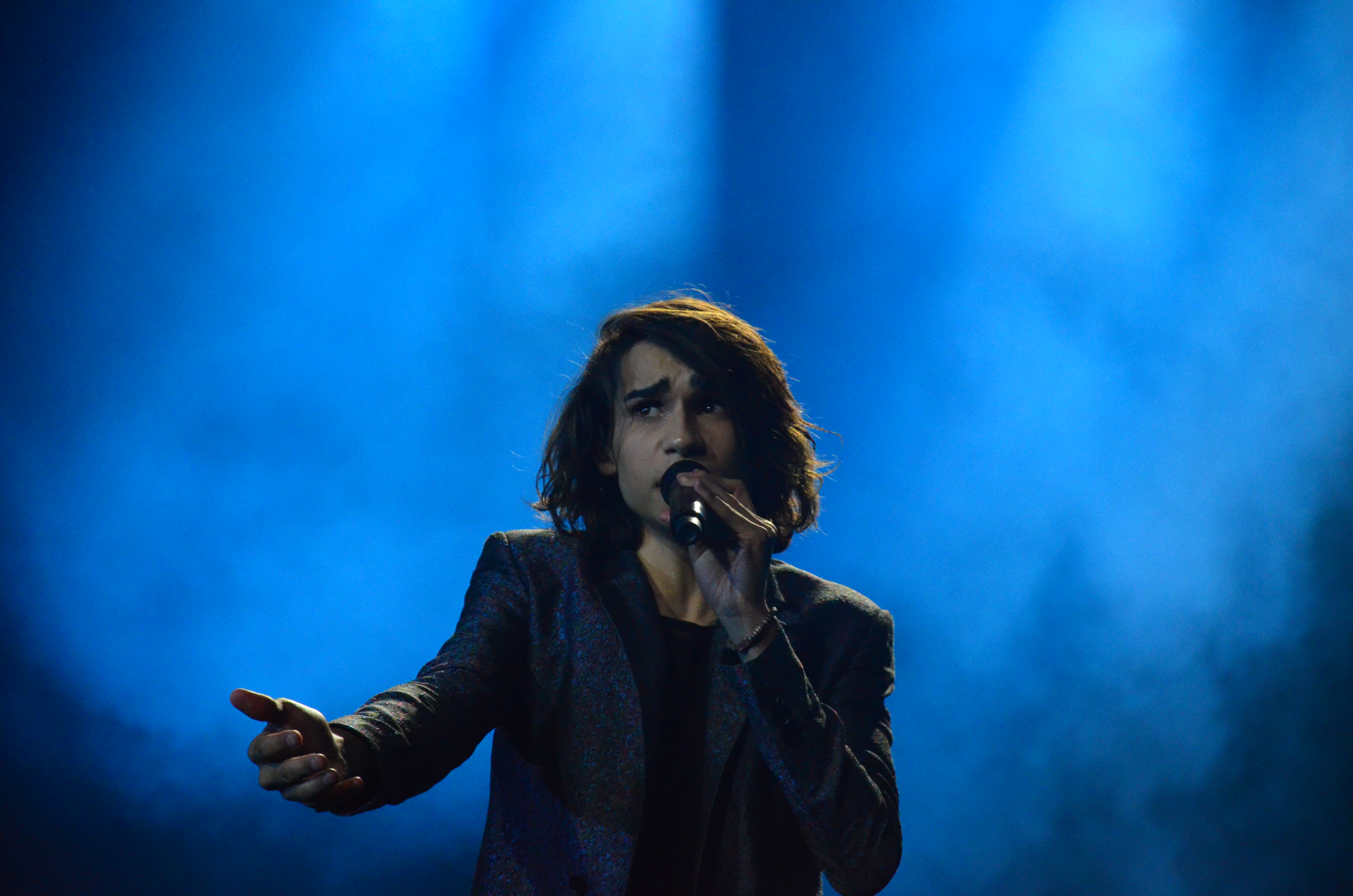 12 травня. Генеральна репетиція фіналу Євробачення 2017. Isaiah (Australia)